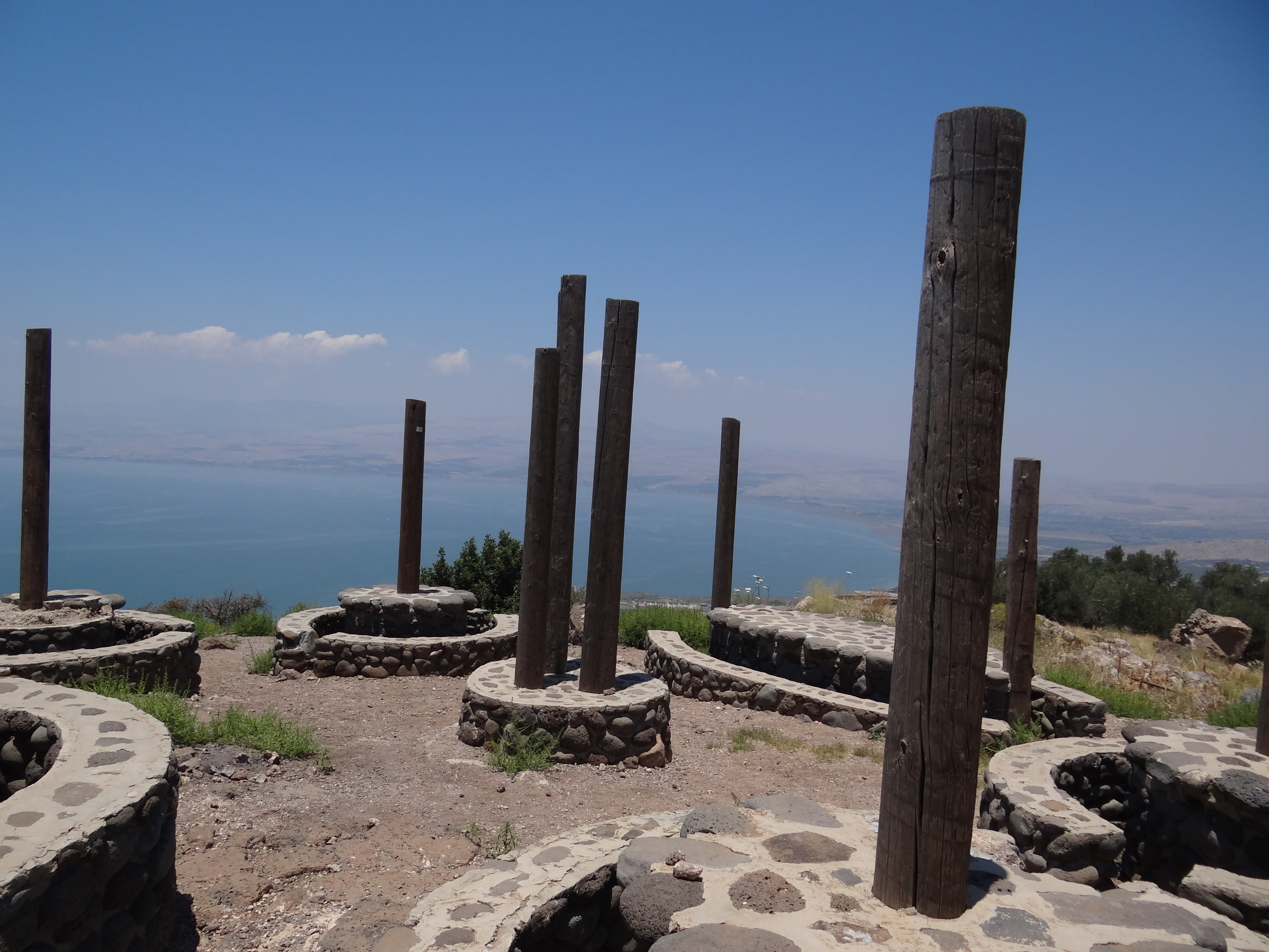 מצפה אופיר ברמת הגולן ליד היישוב גבעת יואב חלקה הצפוני של הכנרת. המצפה הוקם לזכרו של אופיר שנפטר בגיל 16 על ידי אביו